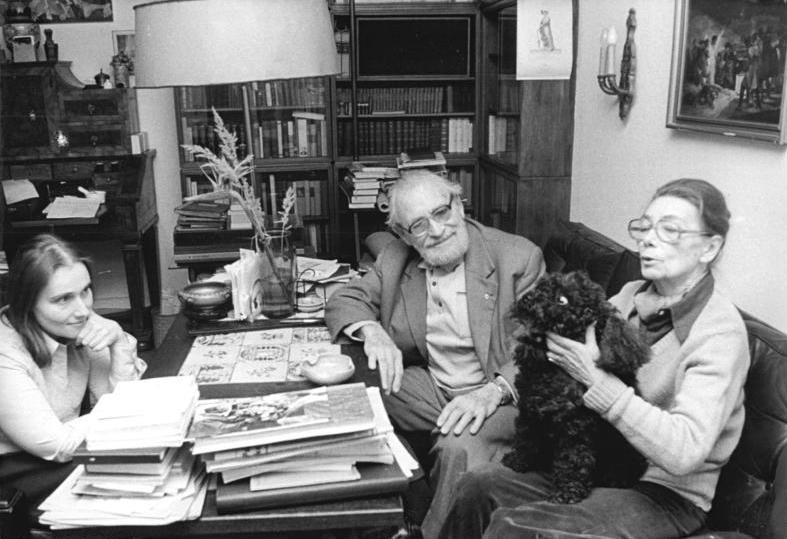 ADN-ZB Senft 15.5.80 Berlin: Prof. Wolfgang Heinz begeht am 18.5.80 seinen 80. Geburtstag. Der Präsident des Verbandes der Theaterschaffenden, Schauspieler, Regisseur und Theaterleiter unterschrieb seinen ersten Theatervertrag an seinem 17. Geburtstag für das Sommertheater in Friedrichroda. In seiner Berliner Anfangszeit lernte er bei Max Reinhardt und Leopold Jessner (ß). Seine Frau, die Schauspielerin Erika Pelikowsky, lernte Wolfgang Heinz 1948 in Wien am fortschrittlichen "Neuen Theater in der Scala" kennen. Auch die Tochter, Gabriele Heinz, teilt die Liebe der Eltern zum Theater und wurde Schauspielerin. Sogar der Hund der Familie - er heißt Cico, erhielt seinen Namen nach dem Theaterstück "Das Testament des Hundes". (siehe 23 und 25N)